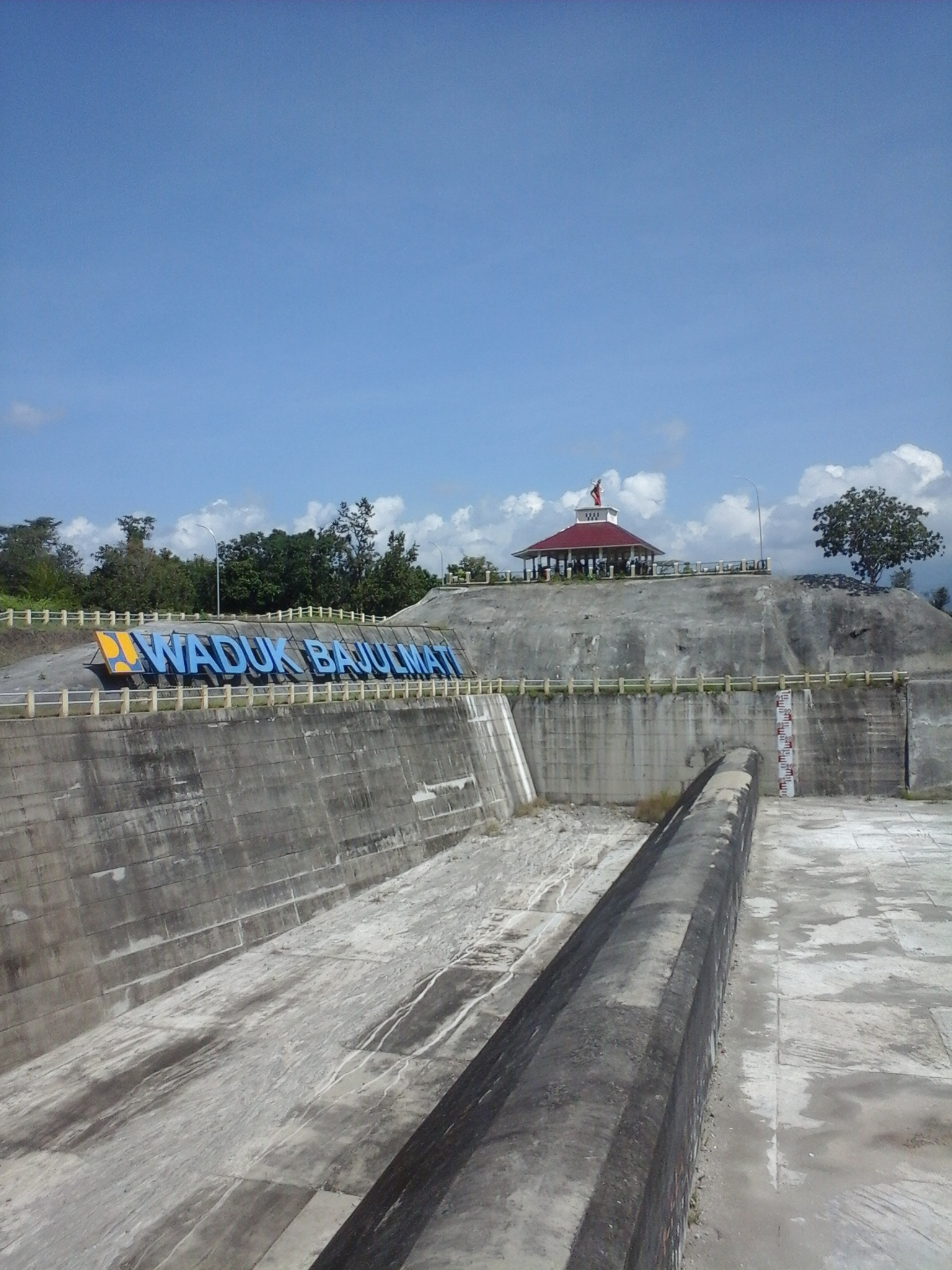 Papan nama Waduk Bajulmati